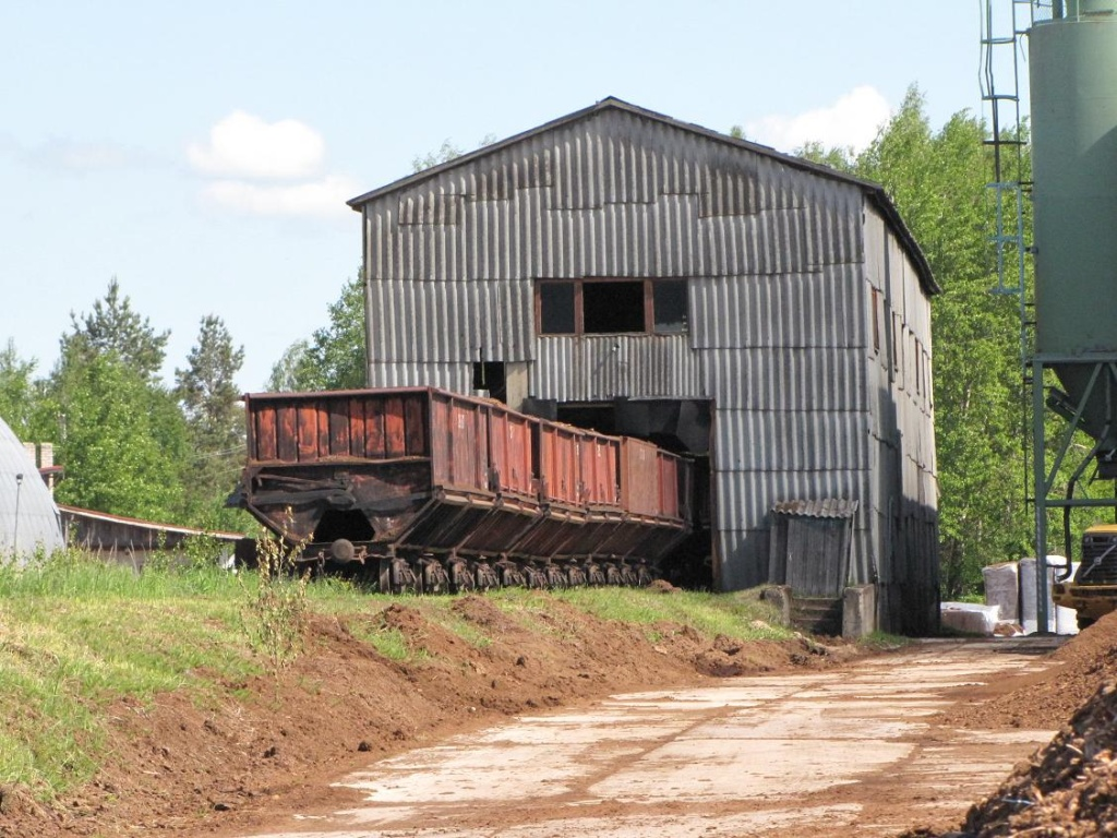 Состав на путях